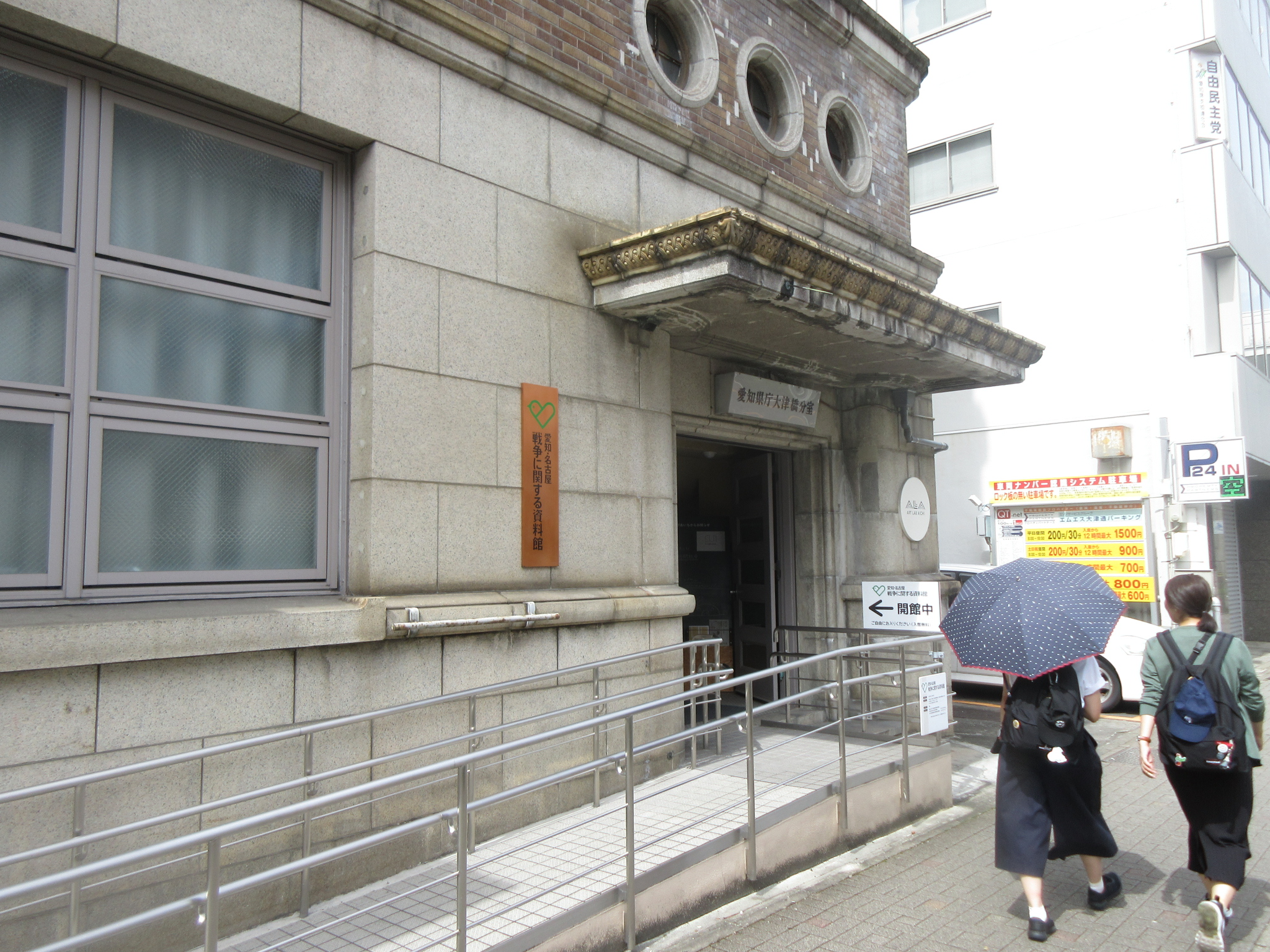 愛知県庁大津橋分室（名古屋市中区三の丸三丁目）